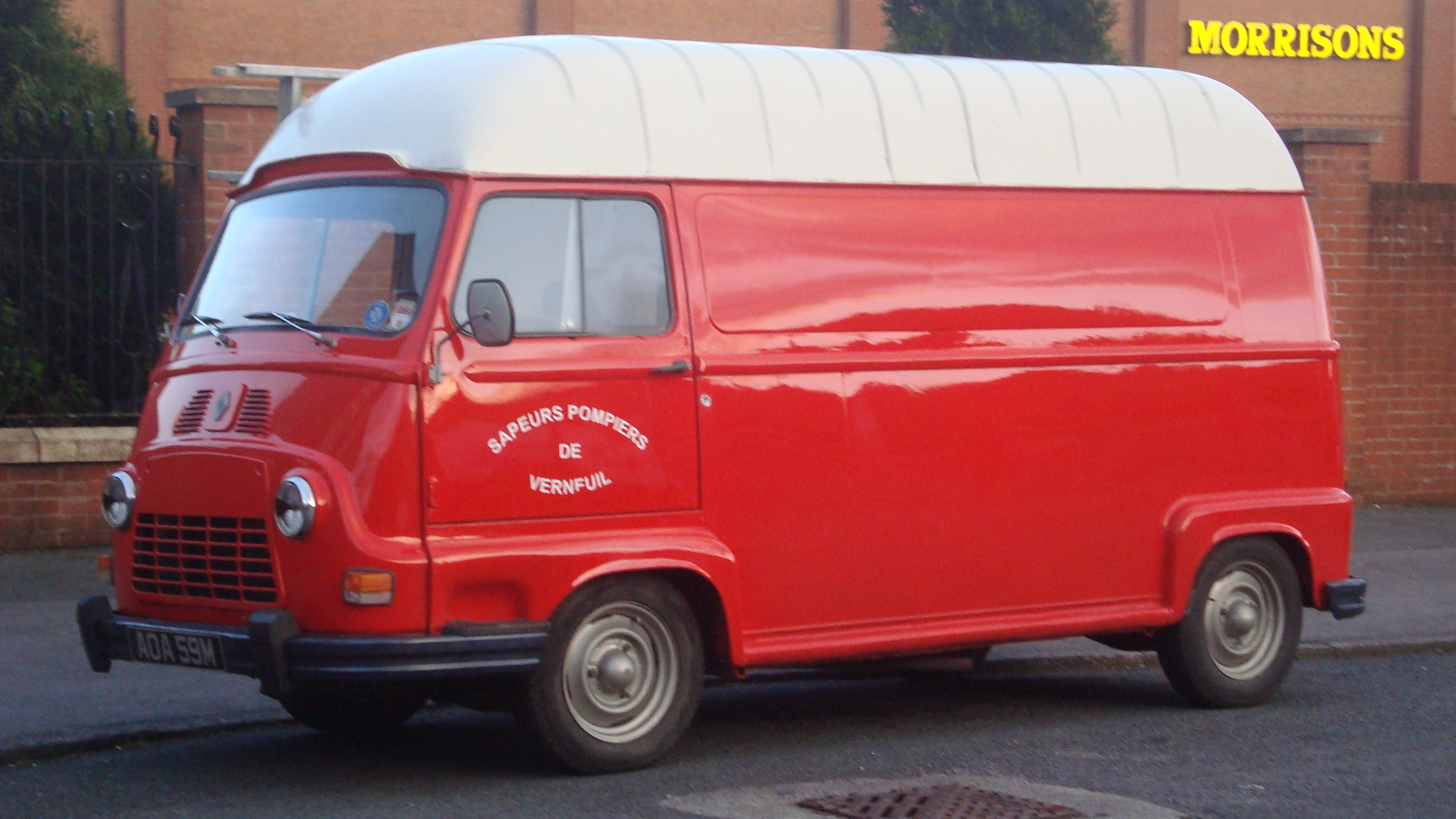 Strange looking little van